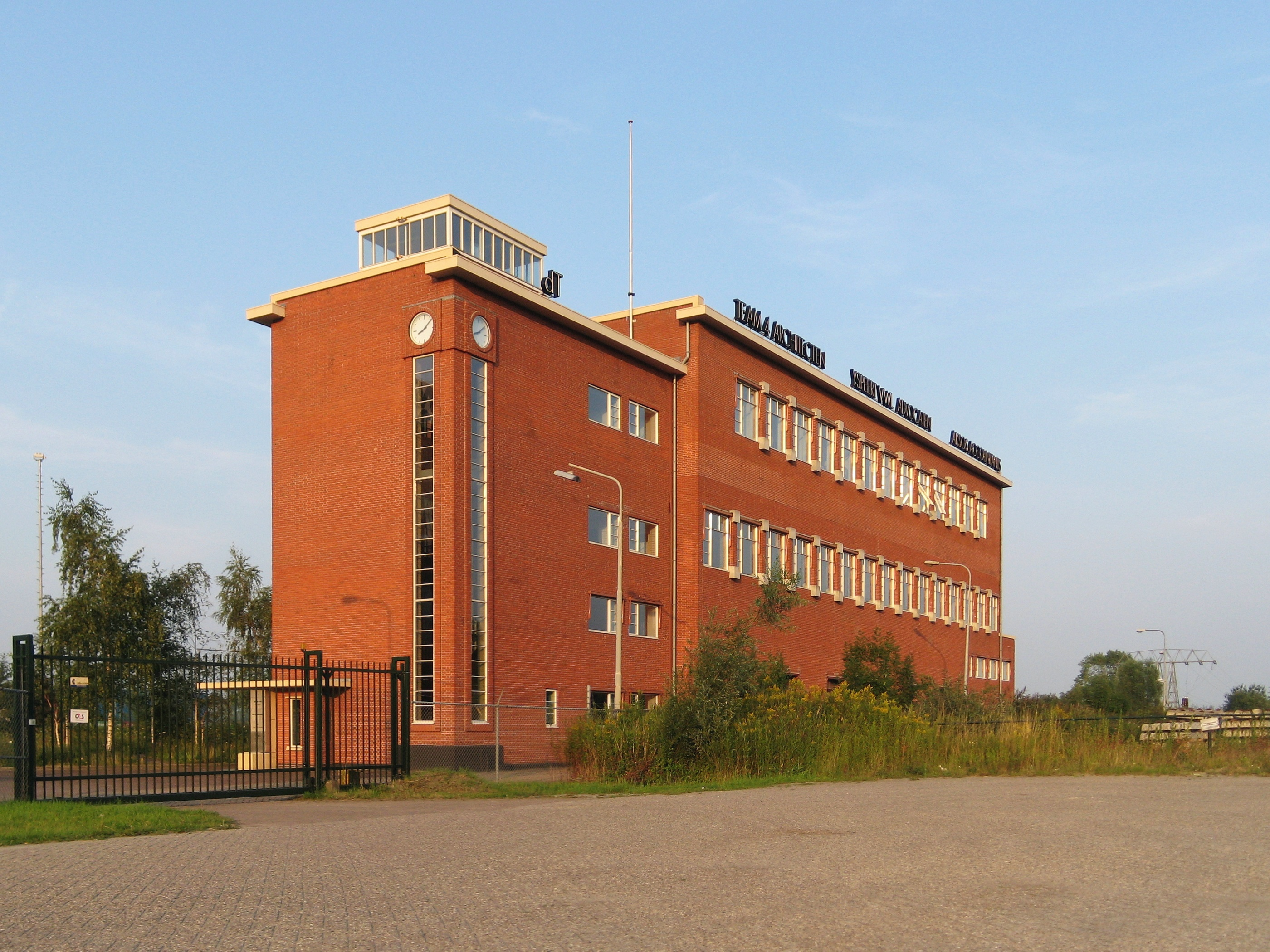 It kantoargebou fan de eardere Helpmancentrale yn Grins. It is setten yn 1931-'32 en waard ûntwurpen troch de yndustrie-arsjitekt A.H. van Rood (1885-1947).